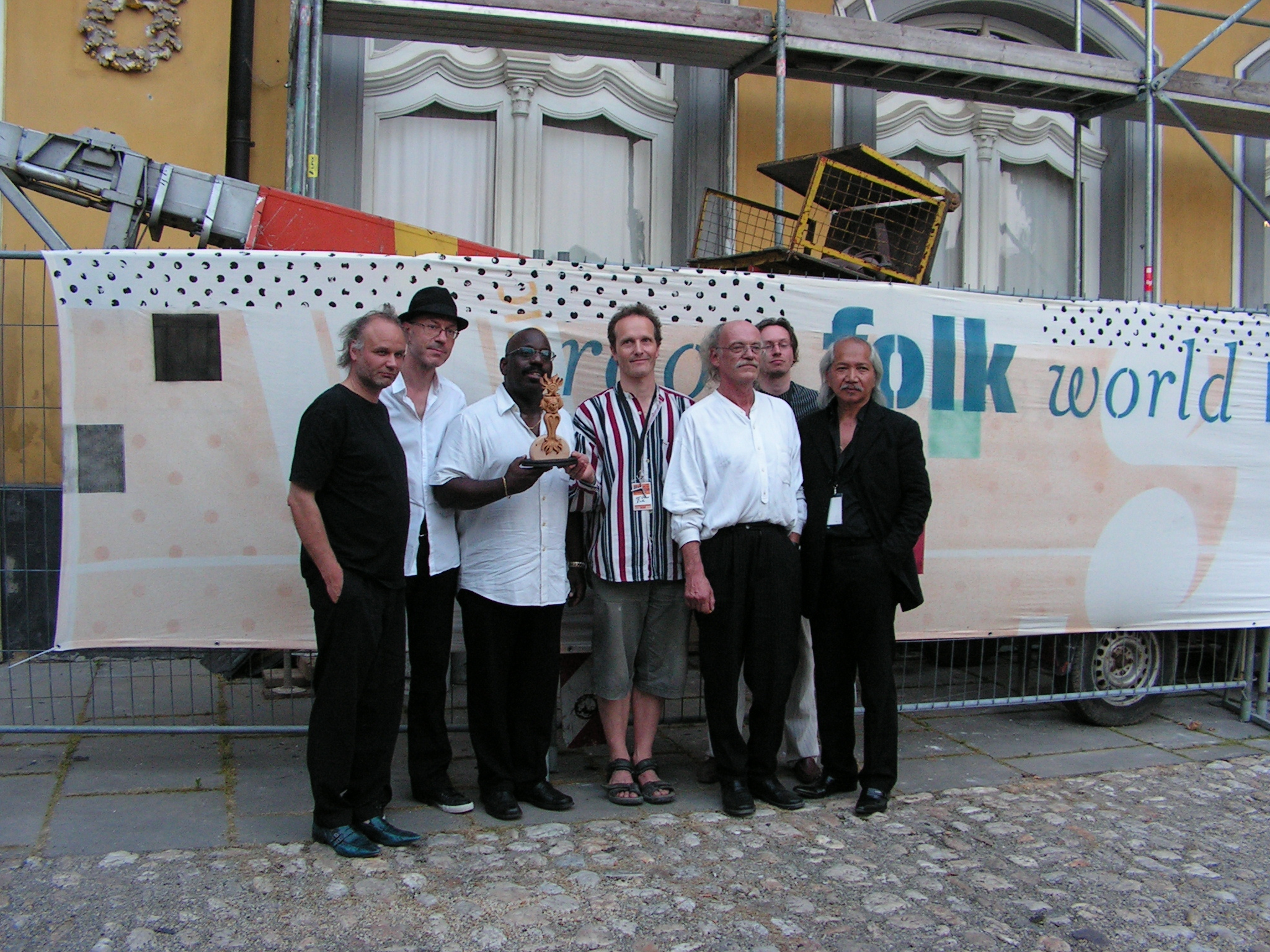 Gruppe BAYON mit der Ehren-RUTH für ihr Lebenswerk